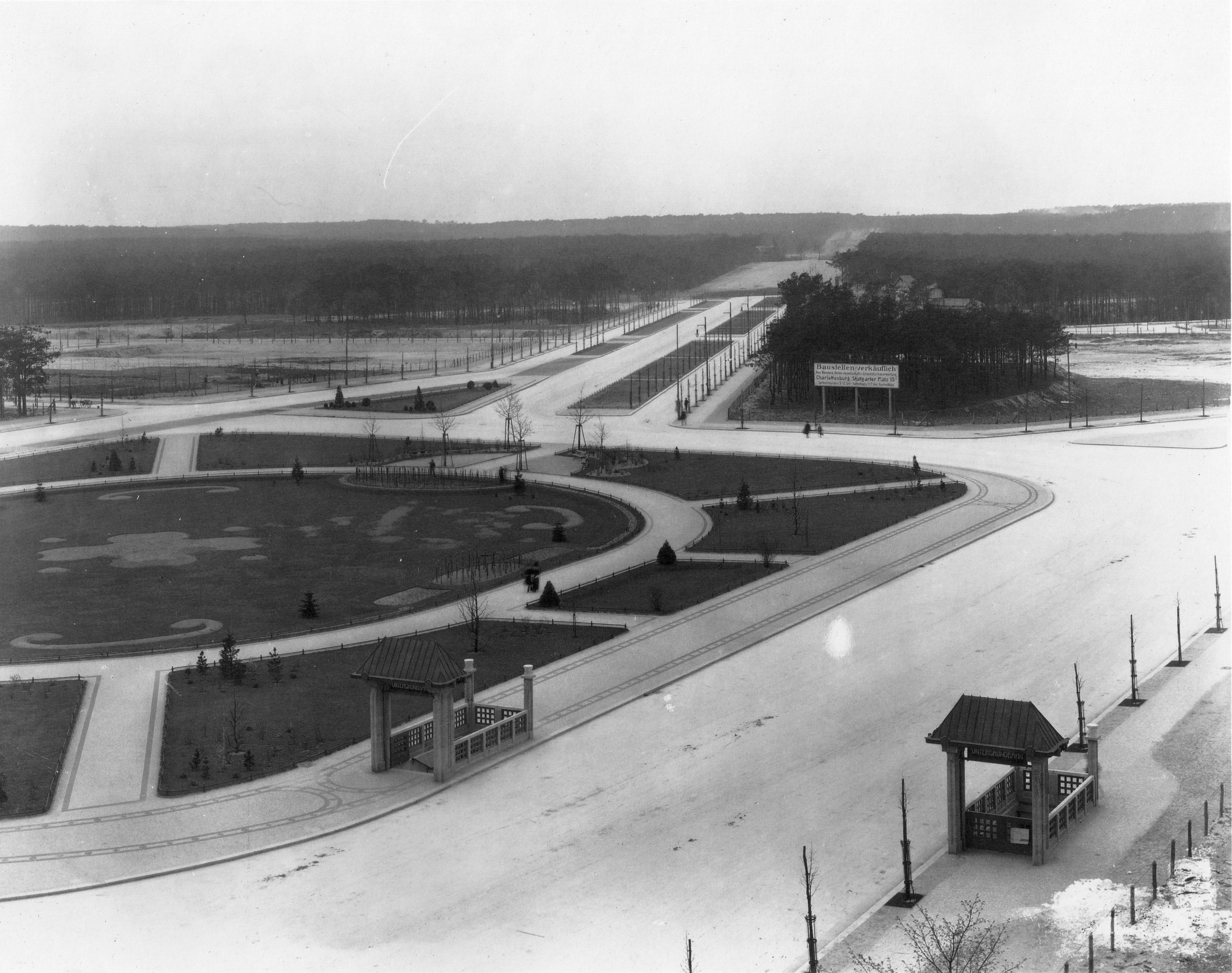 Berlin. Reichskanzlerplatz, im Hintergrund die Heerstraße im Bau.